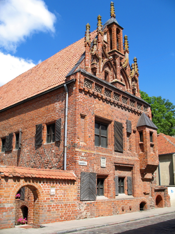 Perkūno namas, Kaunas.